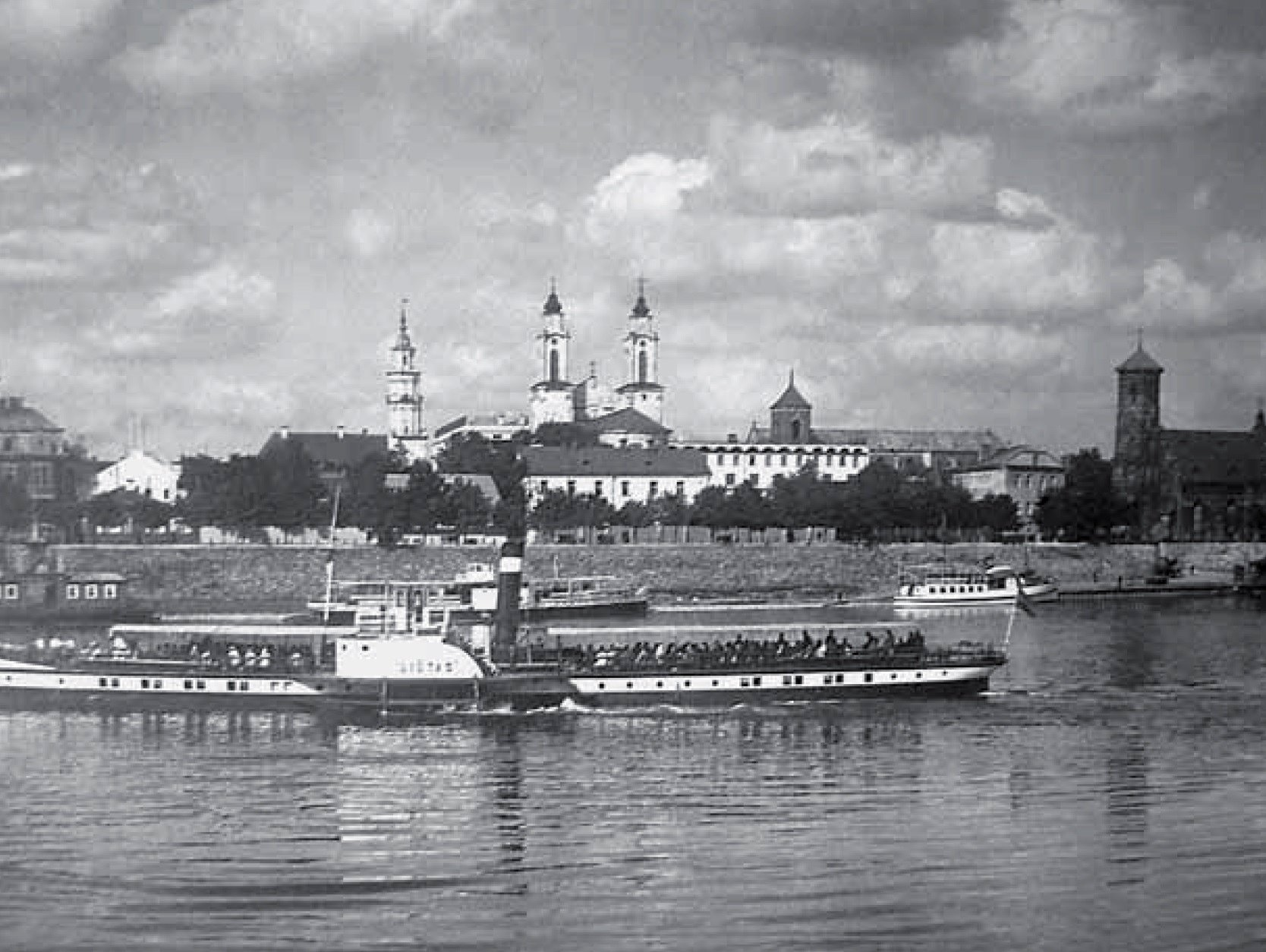 Dampfschiff Riesa (Schiff, 1863)